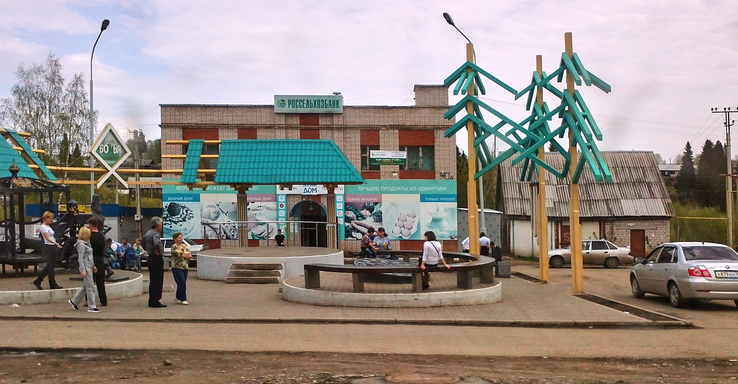 Якшур-Бодья, Центральная площадь. Архитектурно-скульптурный комплекс «Якшур-Бодья — открытый дом»